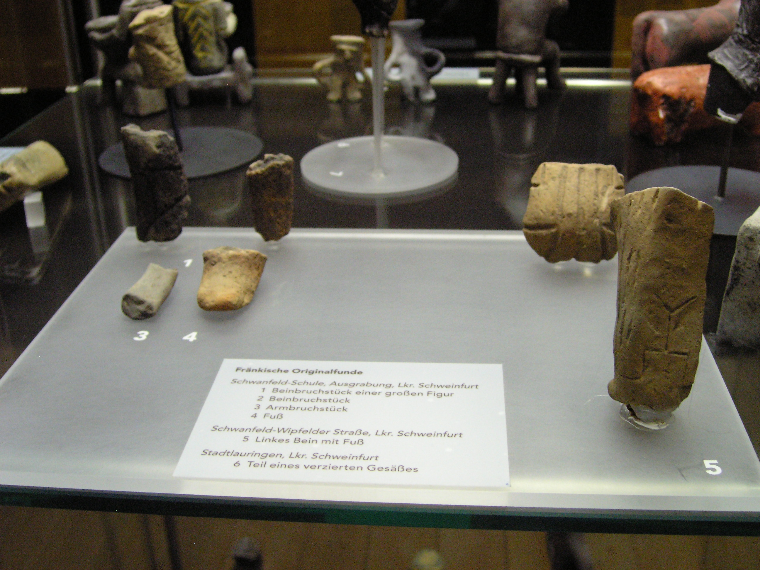 Bandkeramik-Museum Schwanfeld, Idolfiguren der Bandkeramischen Kultur